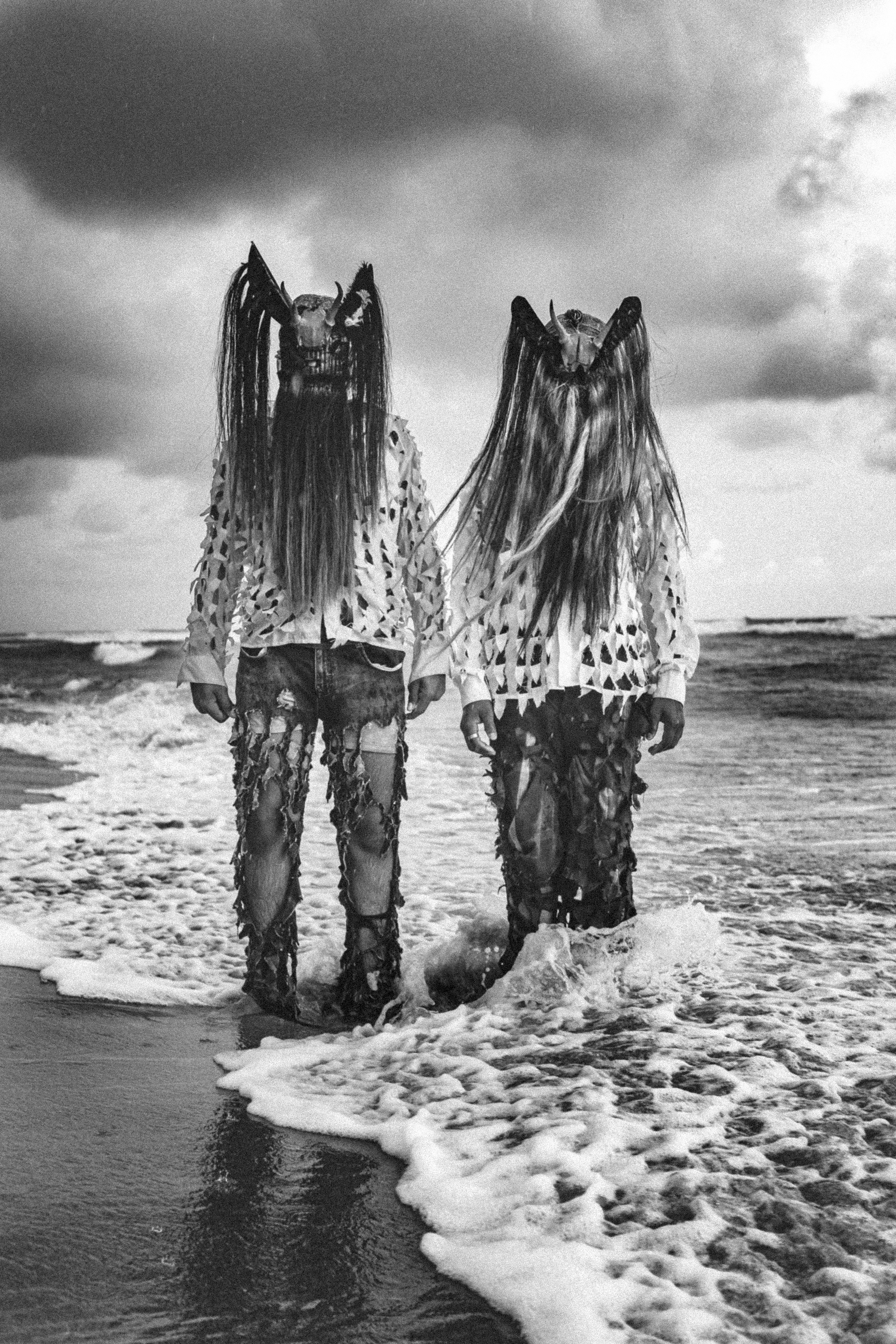 Danza de los diablos en Santa Maria Chicometepec